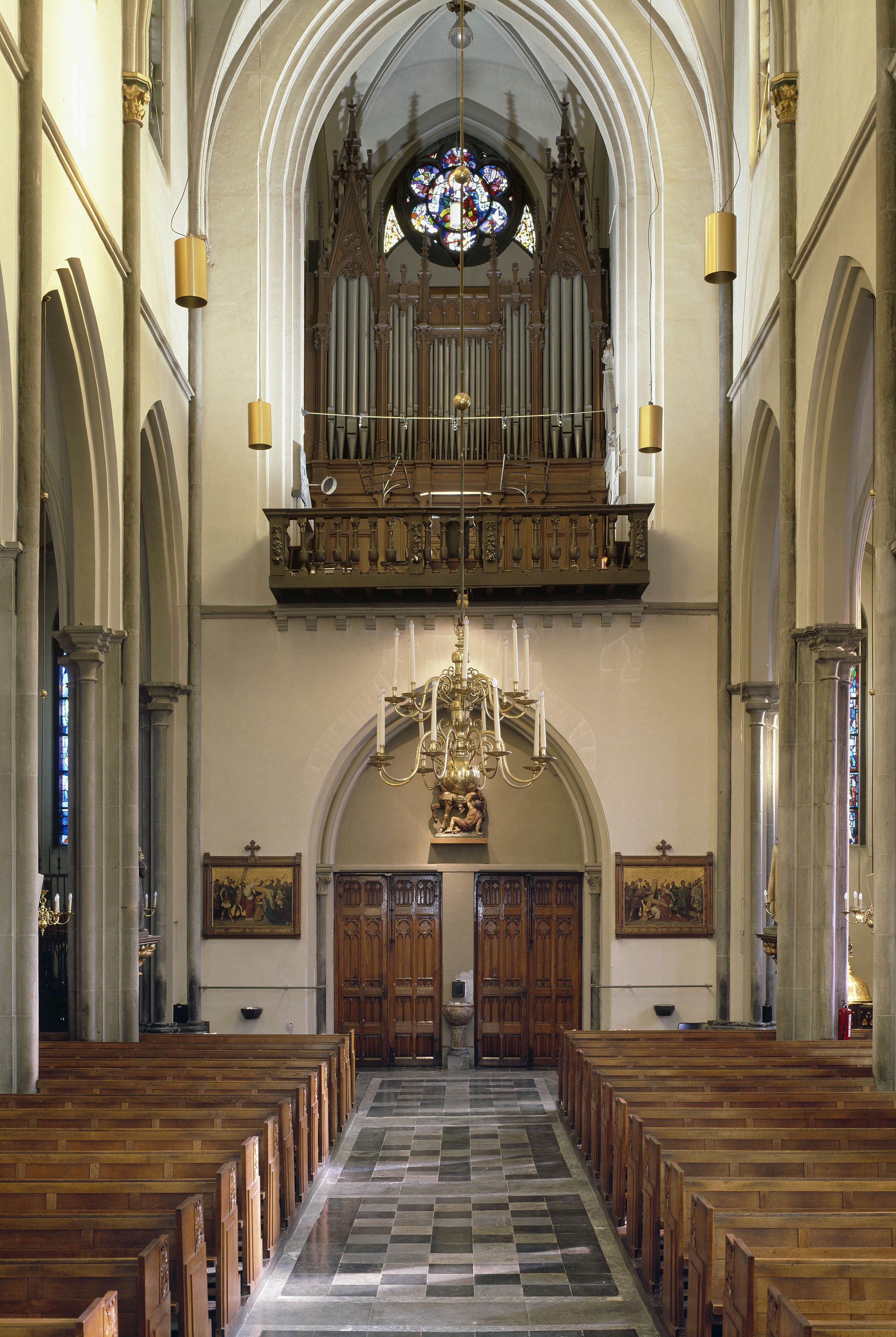 Sint Martinuskerk: Interieur, aanzicht orgel, orgelnummer 931 (opmerking: Gefotografeerd voor Het Historische Orgel in Nederland 1878-1886, Bladzijde 31)